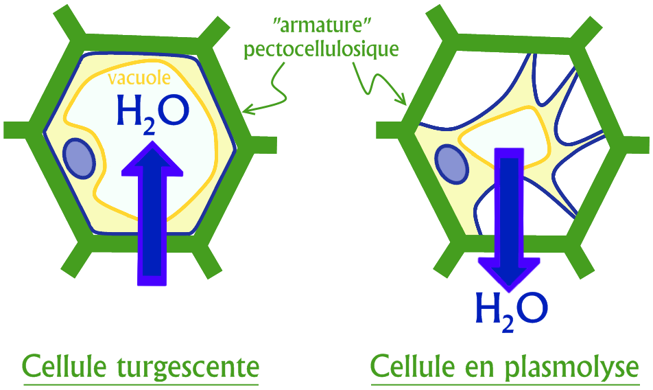 Principe de la turgescence et de la plasmolyse, pour une cellule végétale, avec mouvements d'eau par osmose